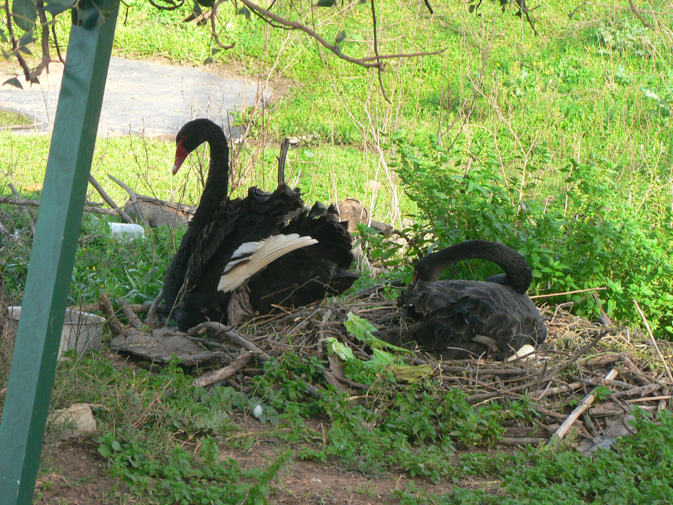 צולם בגן הזואולוגי בת"א Taken in Tel Aviv Zoological Gardens ברבור שחור Black Swan